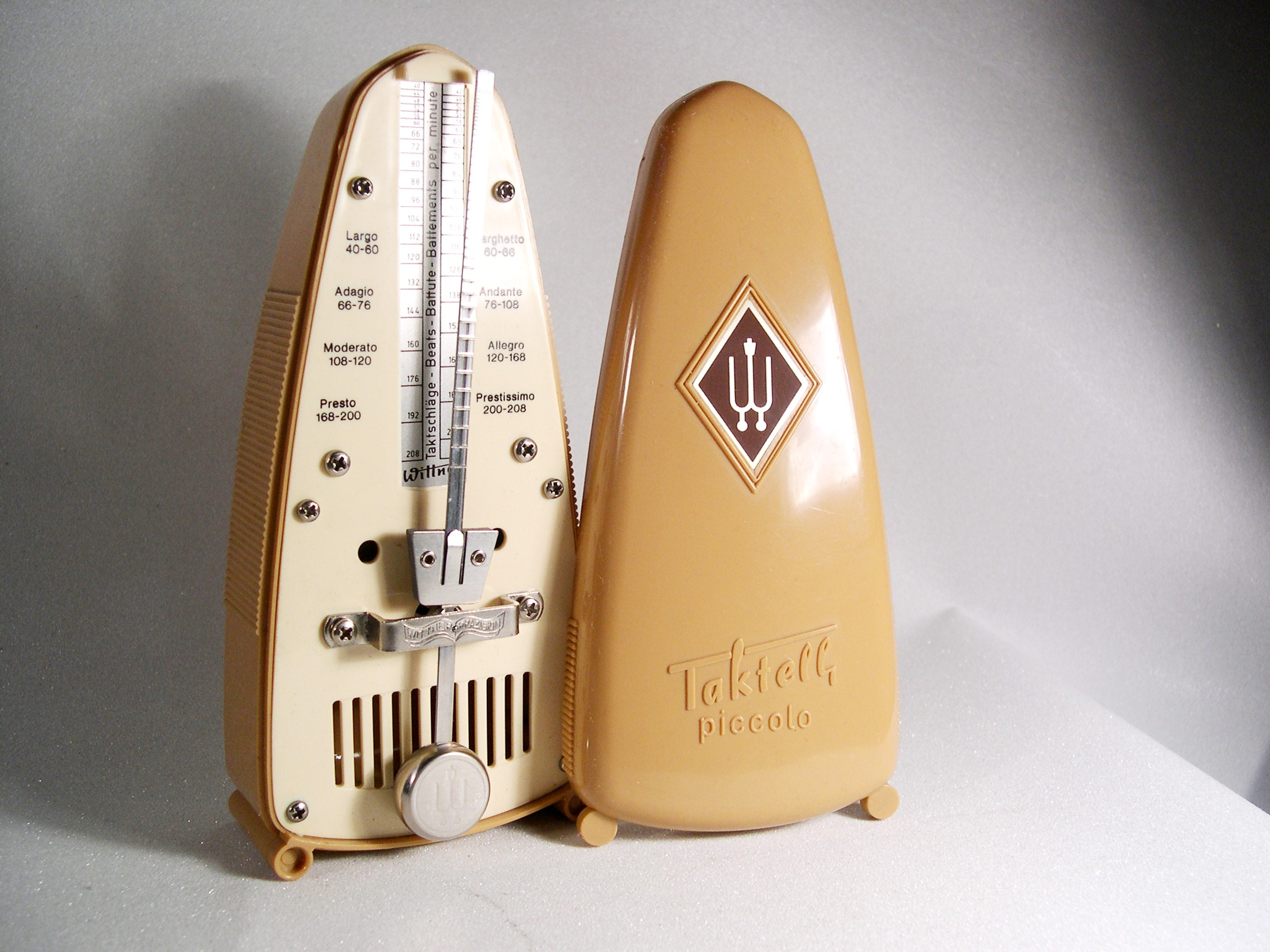 Taktell Piccolo Metronoom